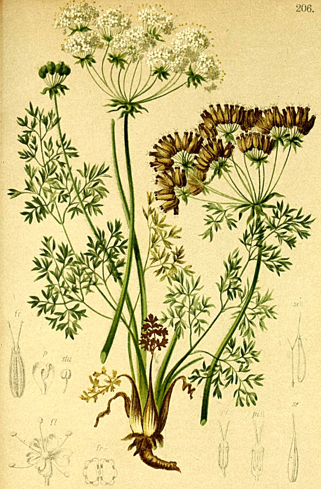 Atamanta cretensis